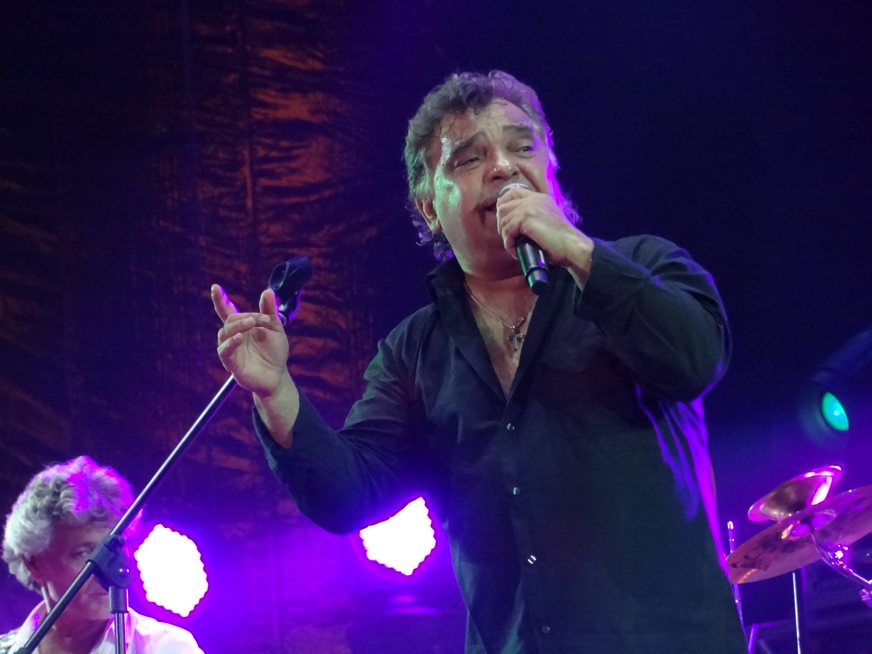 Концерт в рамках XI Международного инвестиционного форума «Сочи – 2012» .